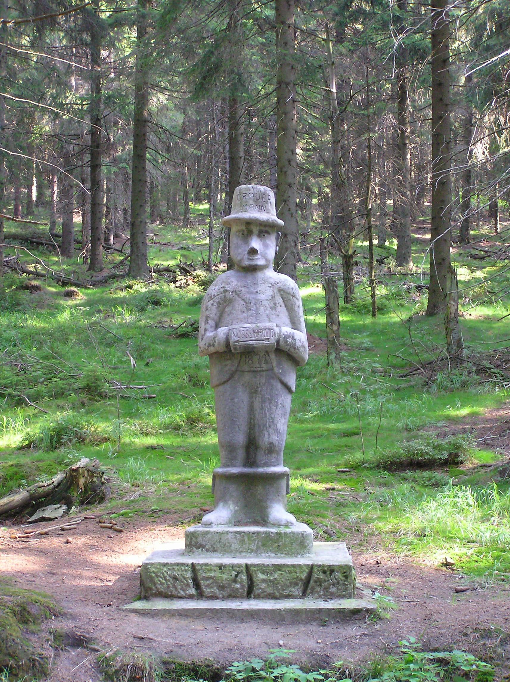 Steinerner Mann oder Grauer Mann an der Spätenwalder Ewigkeit (Wieczność) genannten Waldschneise im Nesselgrunder Forst, Habelschwerdter Gebirge, Woiwodschaft Niederschlesien, Polen.